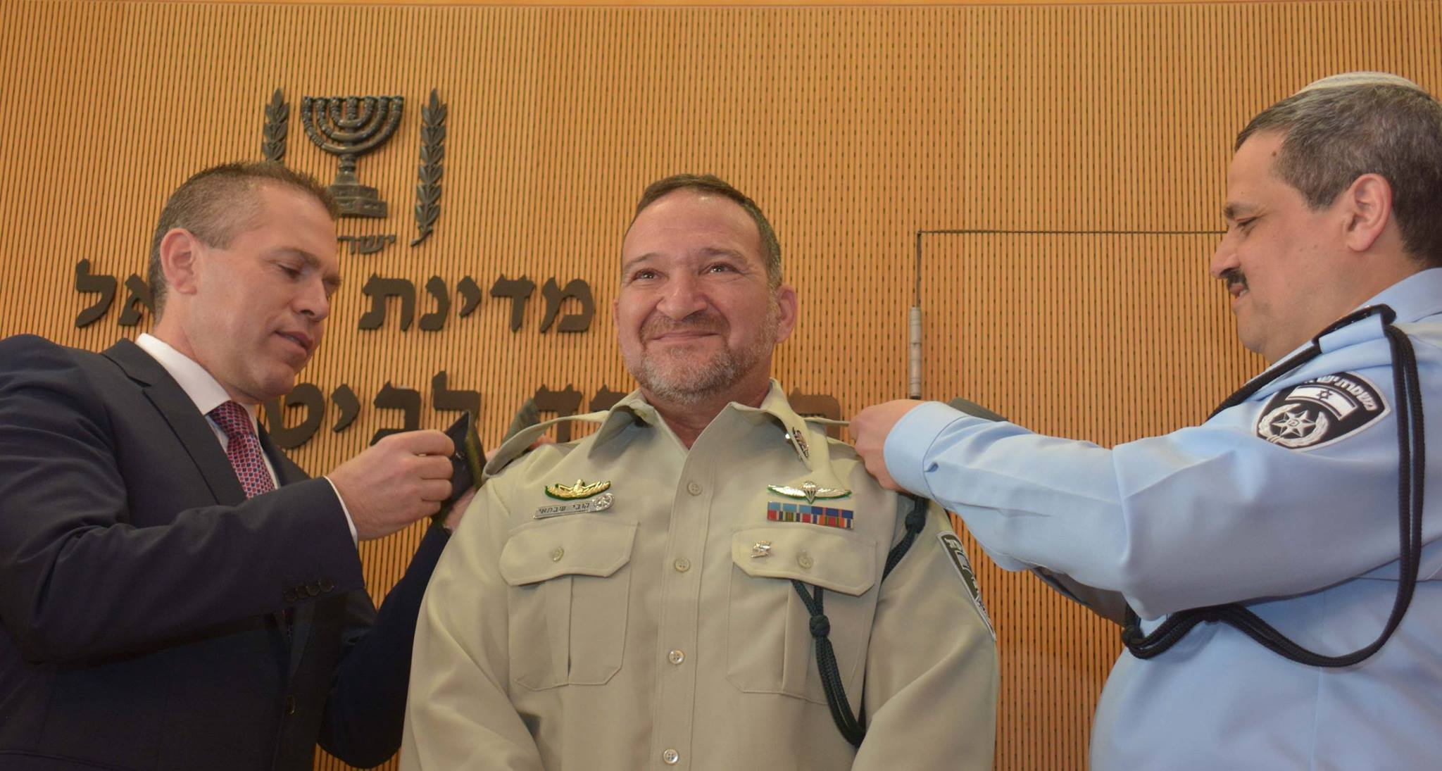 קובי שבתאי